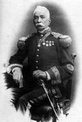 General Juan Buendía Noriega.